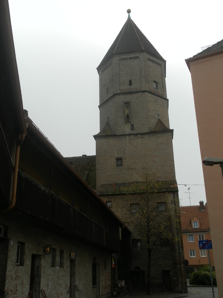 Das Jakobertor war seit der Ummauerung der Jakober Vorstadt das Tor Augsburgs zum jenseits des Lechs beginnenden Herzogtum Bayern.